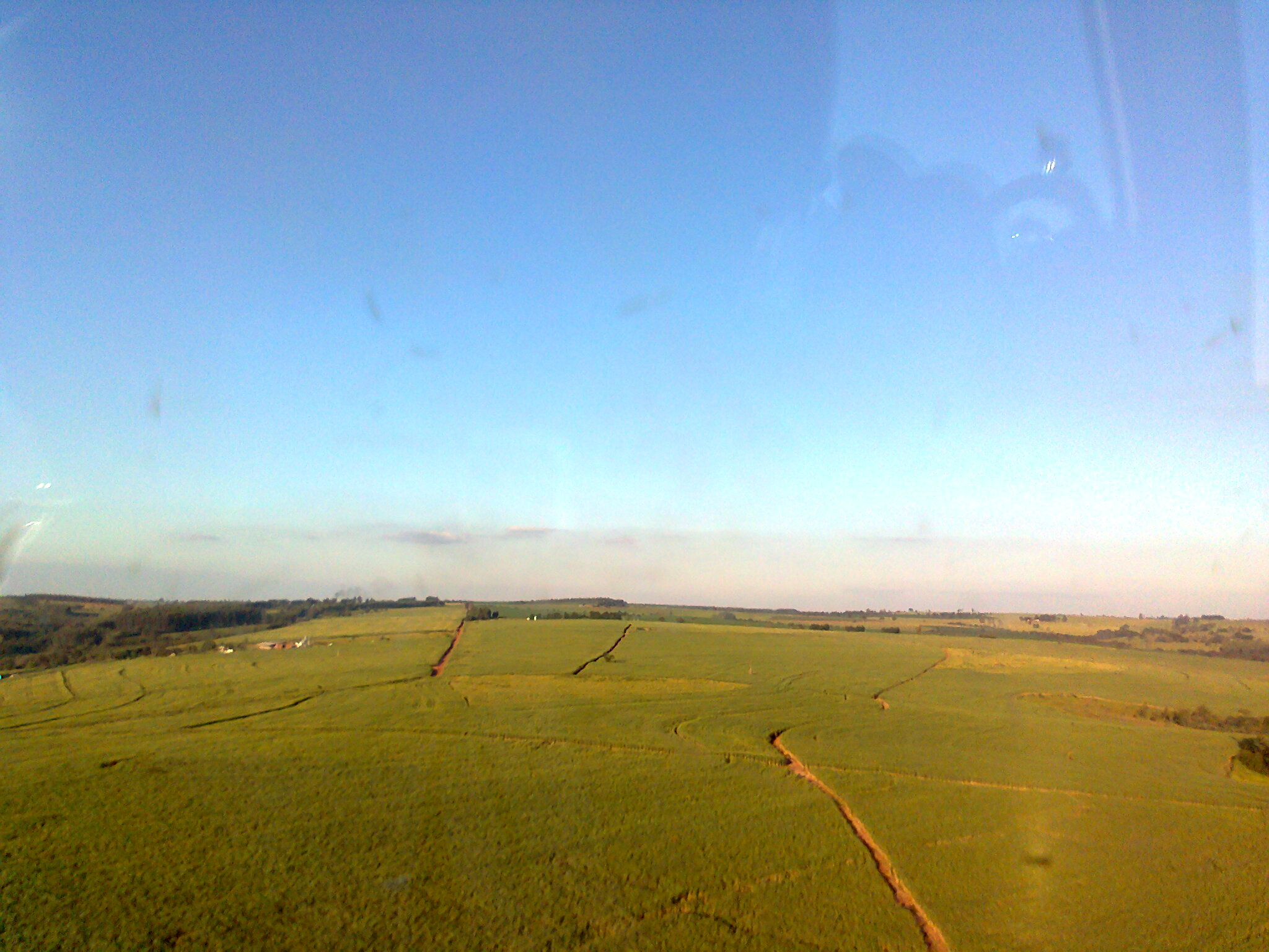 Cana - Usina Tapejara, Paraná